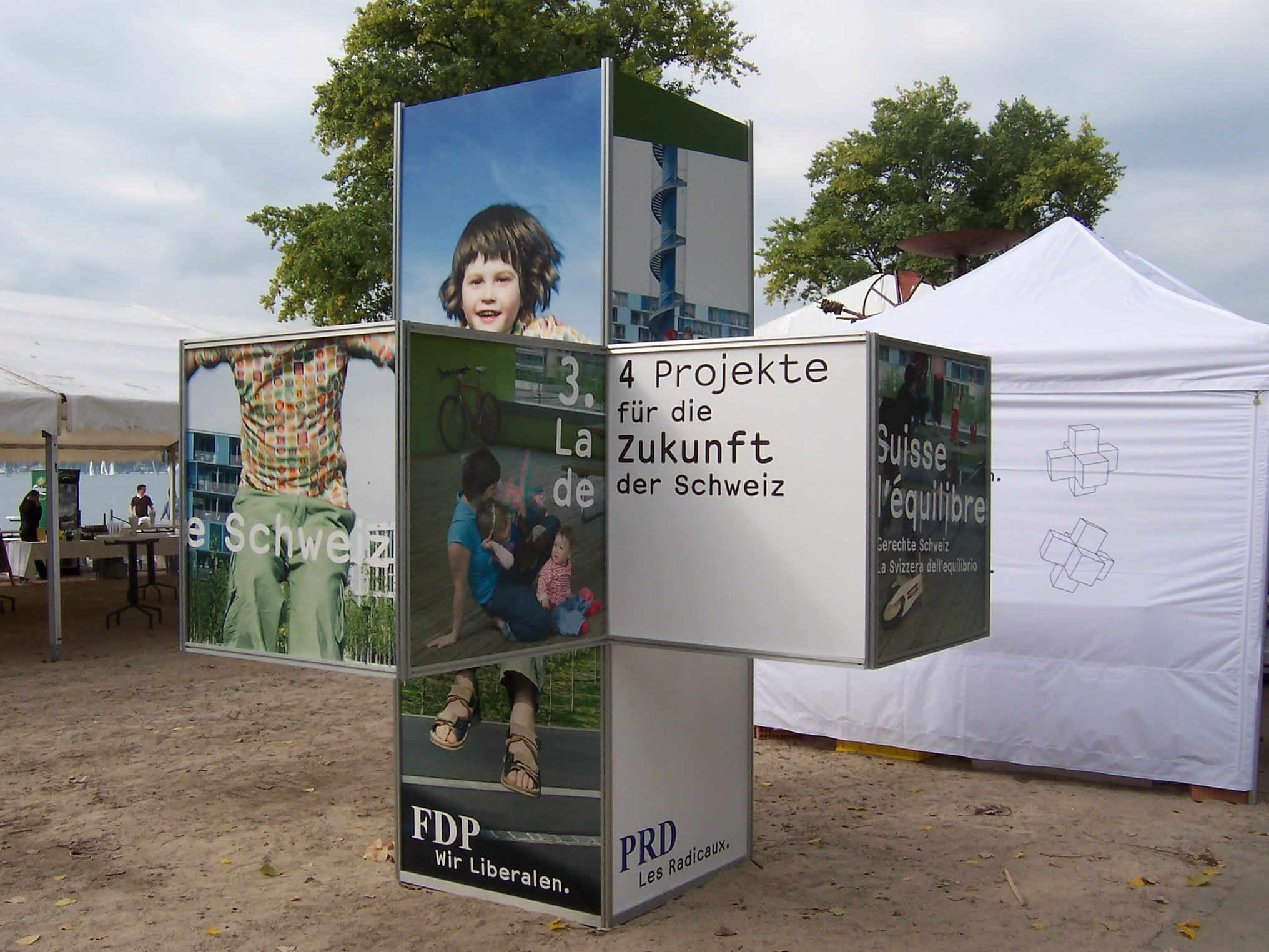 FDP-Logo in Zürich